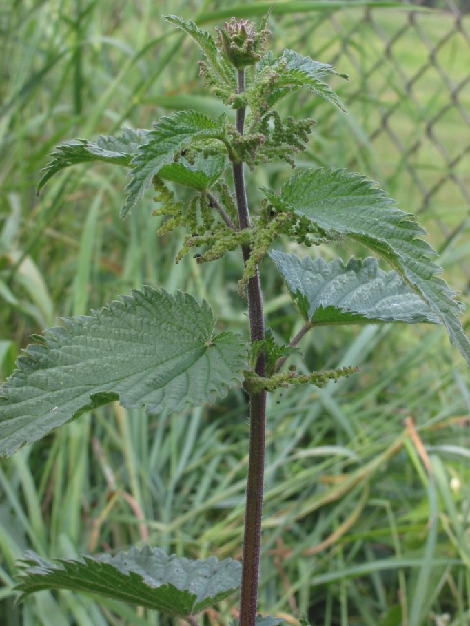 grote brandnetel (Urtica dioica). zelfgemaakte foto begin juni. GFDL